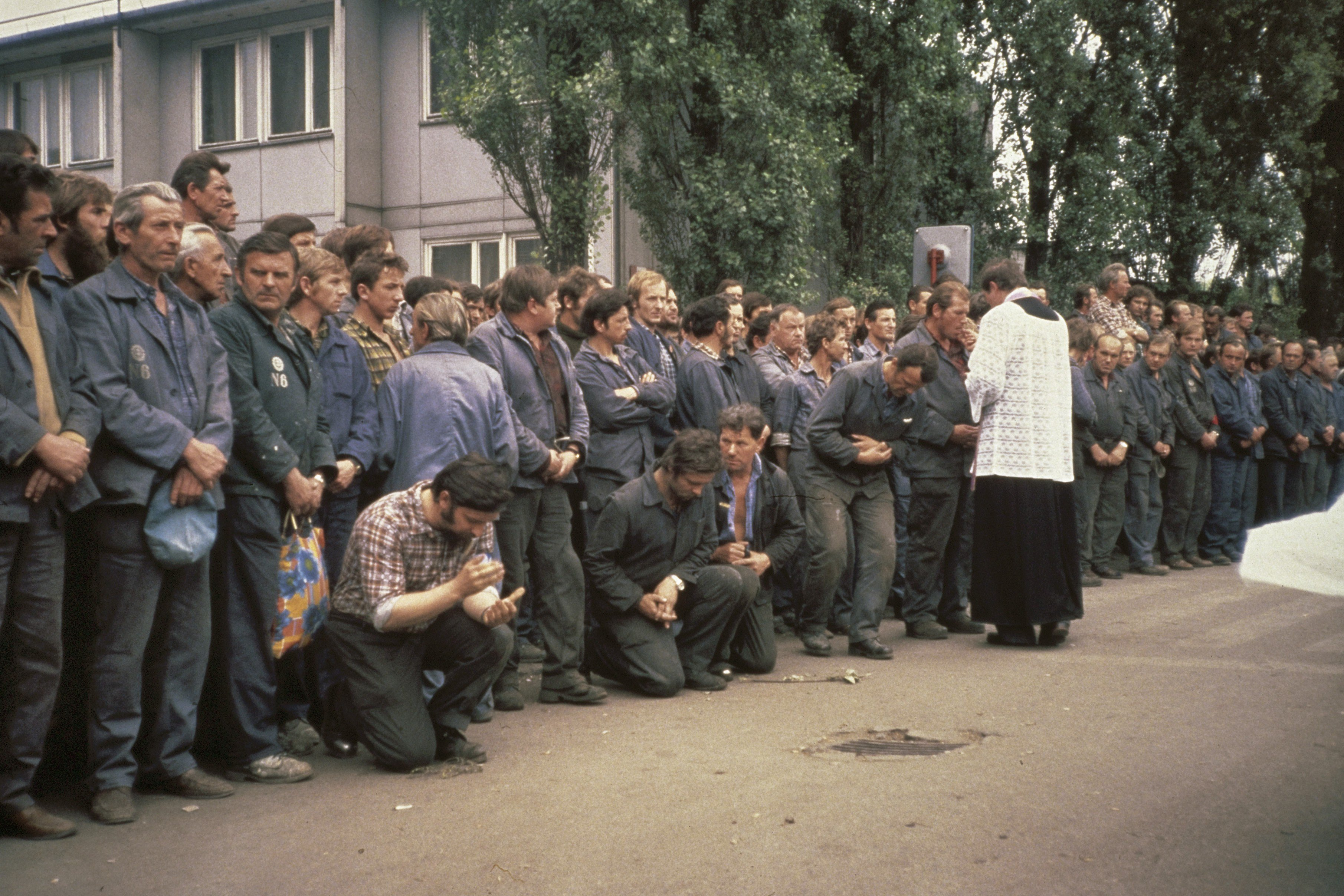 Collectie / Archief : Fotocollectie Anefo Reportage / Serie : Stakingen in Polen 1980: Leninwerf Gdansk Beschrijving : Priester deelt hosties uit aan stakende arbeiders van de Leninwerf tijdens openluchtmis geleid door Henryk Jankowski Datum : 20 augustus 1980 Locatie : Gdansk, Polen Trefwoorden : arbeiders, priesters, religieuze diensten, scheepsbouw, stakingen Fotograaf : [onbekend] Auteursrechthebbende : Nationaal Archief Materiaalsoort : Dia (kleur) Nummer archiefinventaris : bekijk toegang 2.24.01.06 Bestanddeelnummer : 253-8306